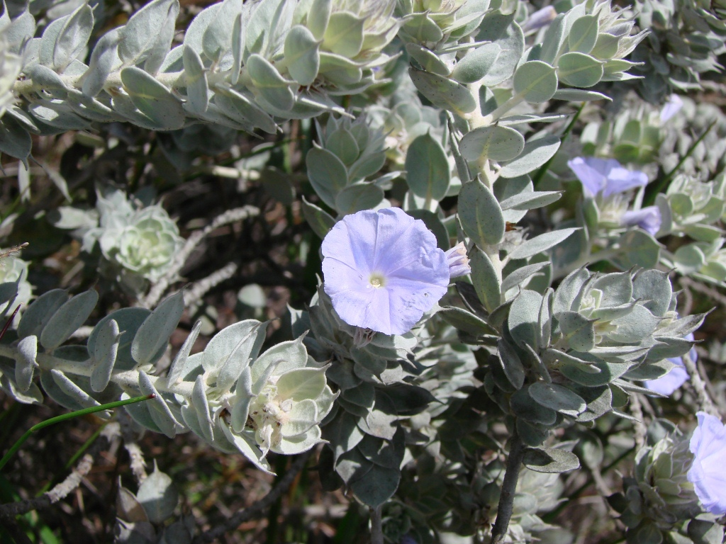 Jacquemontia robertsoniana Buril & Sim-Bianch. - CONVOLVULACEAE - Parque Nacional da Chapada Diamantina - Palmeiras - Bahia - Brasil. Espécie nova recentemente descrita: KEW BULLETIN Vol 67: 1-5 (2012).